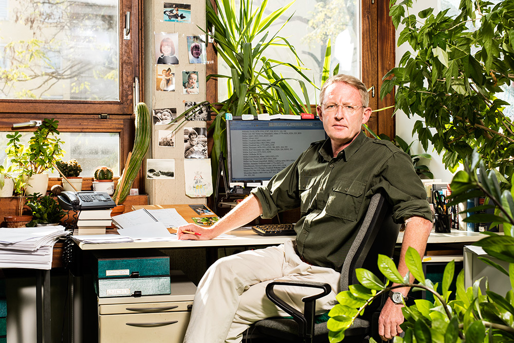 Christian Hartmann, 2015 Aufnahme: Kalle Singer